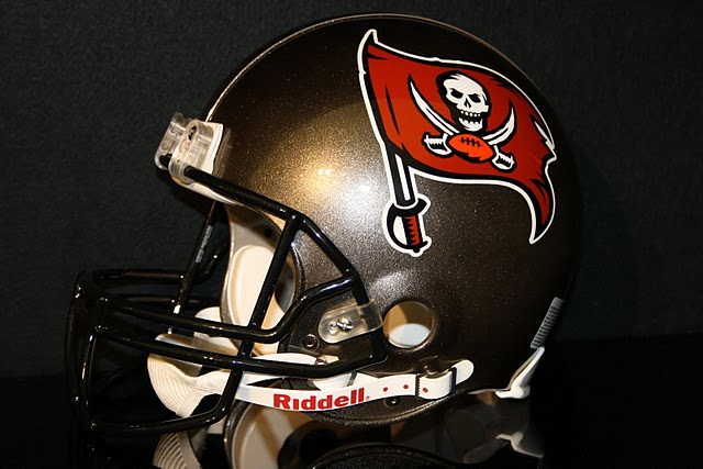 Hjelm brugt af Tampa Bay Buccaneers. Fotograferet da Buccaneers spillede på Wembley i 2009